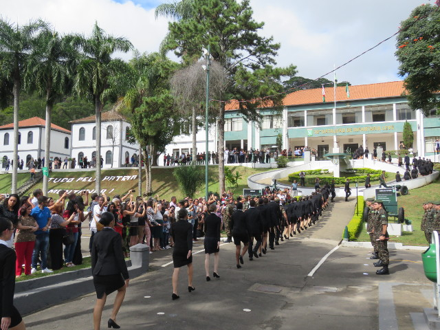 10 BIL